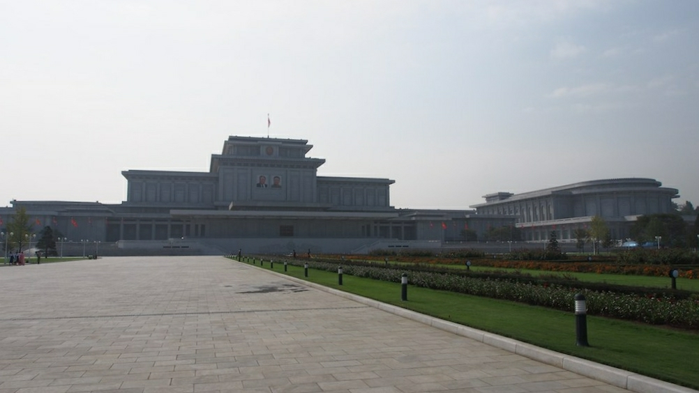 Kumsusan Memorial Palace